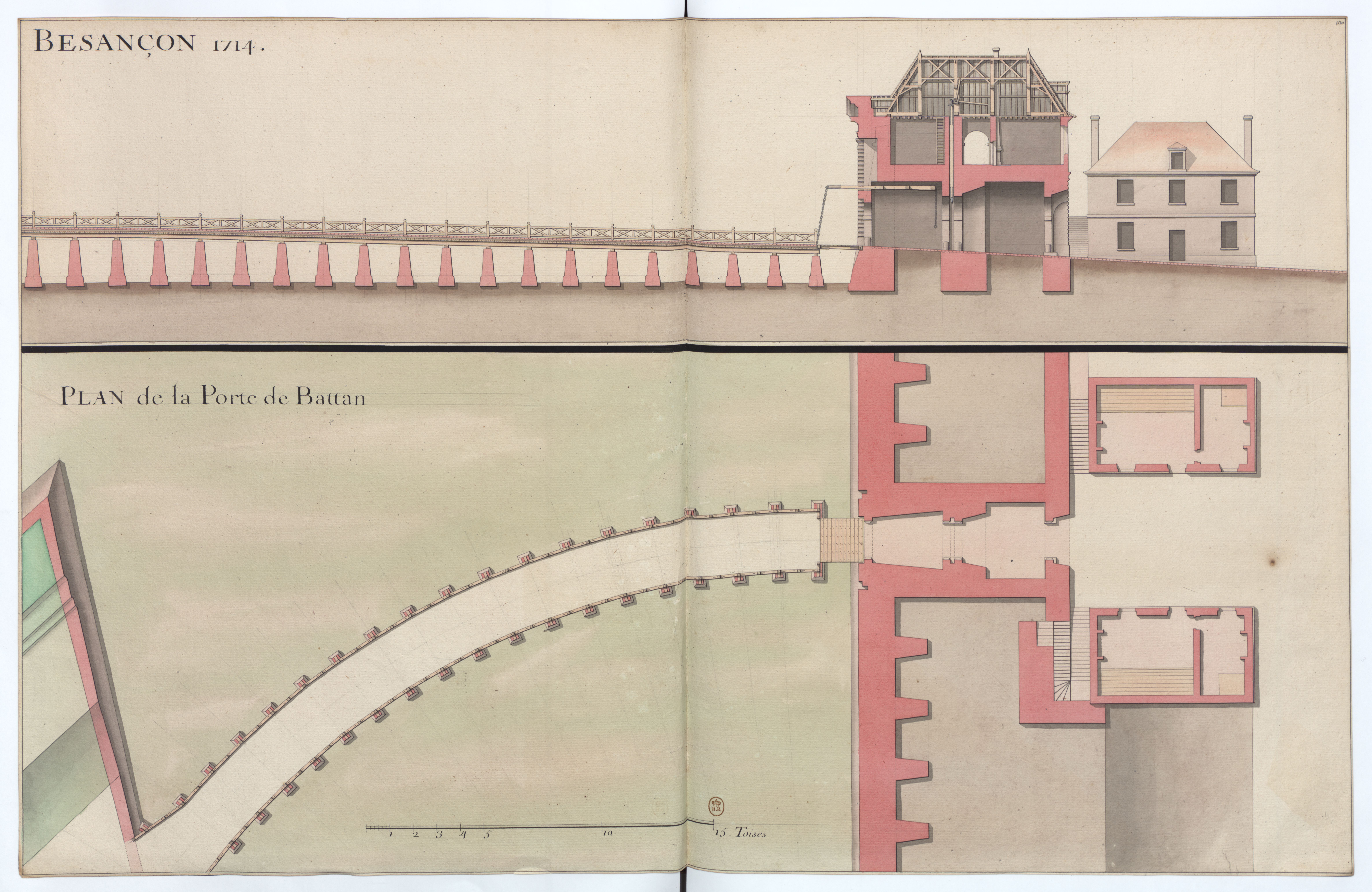 Fait partie de : Plans de Besançon et de ses travaux de défense par Vauban, en 1714